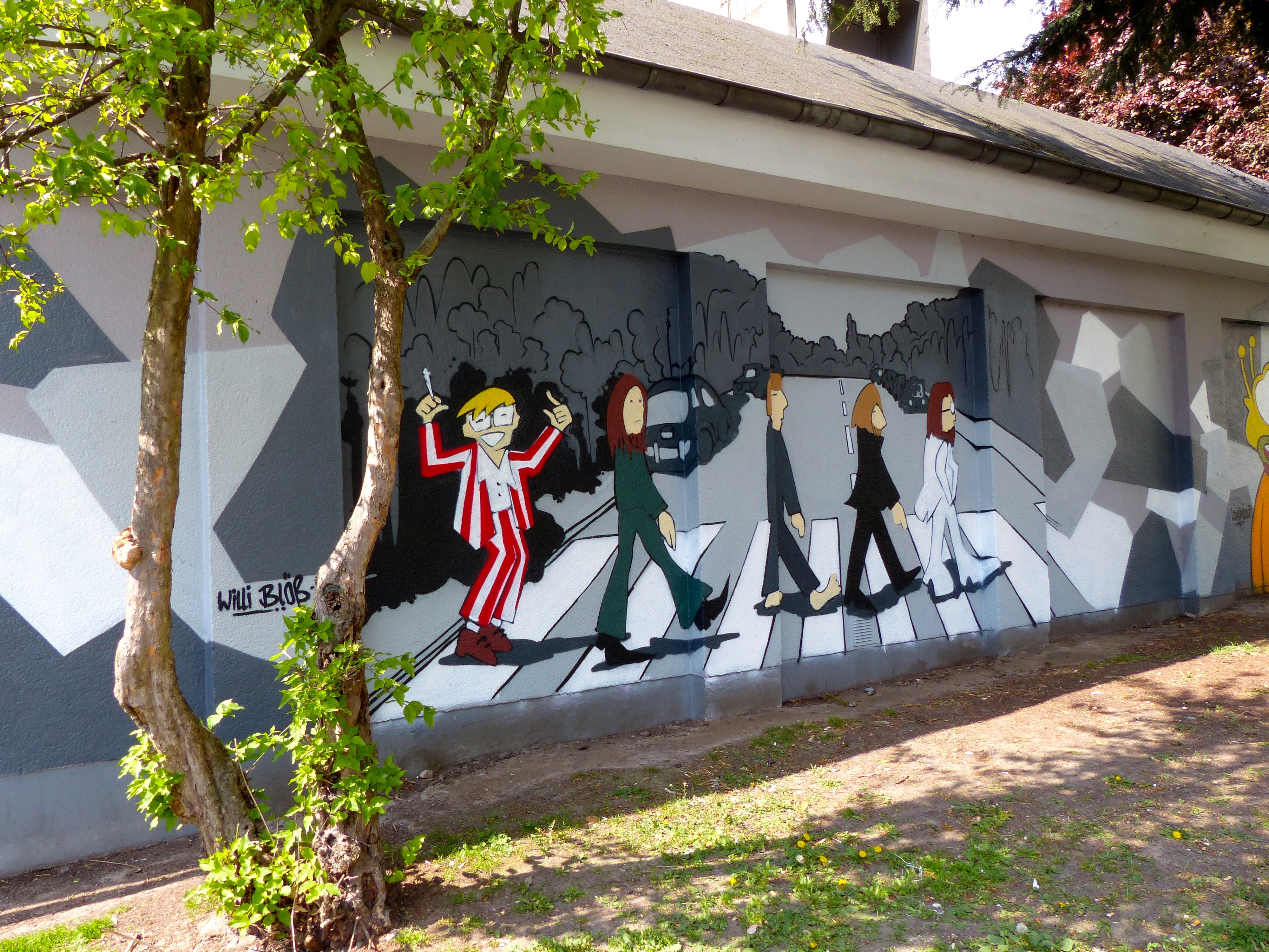 Comiciade Aachen: Graffitti am Transformatorenhaus Blücherplatz